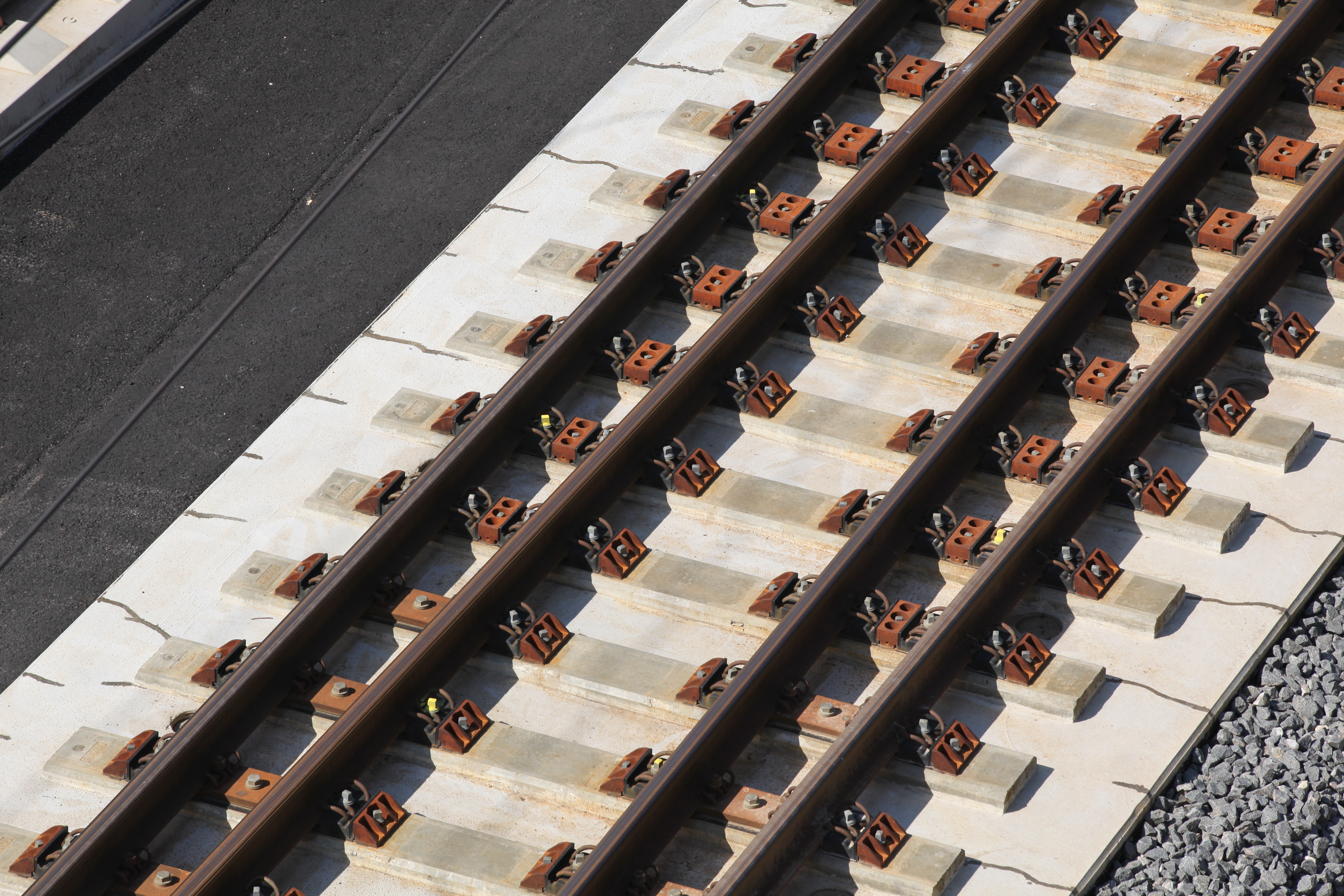 Feste Fahrbahn Sytem Porr, Verbindungskurve Niederfüllbach Weichenabschnitt mit sanierten Betonrissen